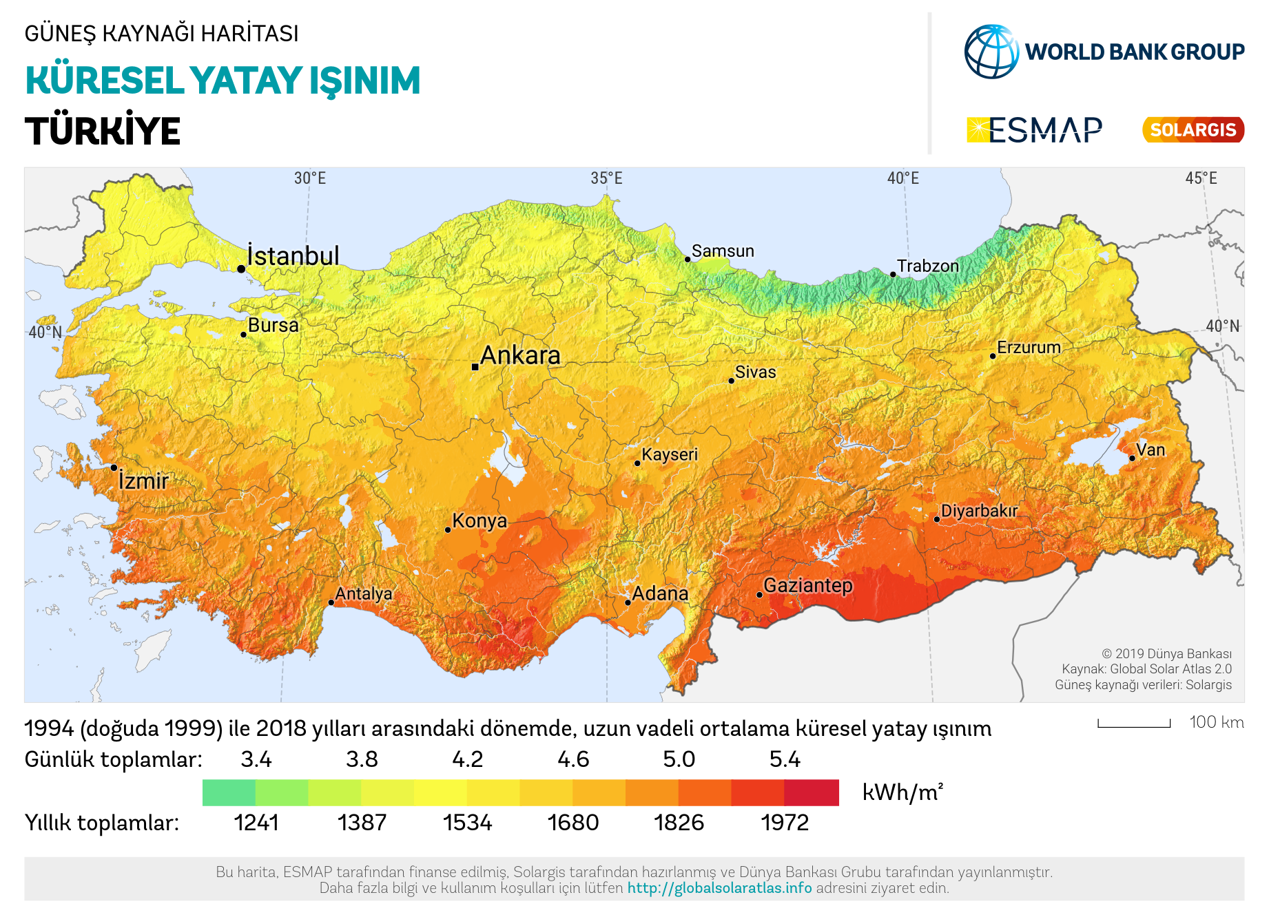 Solar Radiation Map: Kuresel yatay radyasyon - Turkiye, SolarGIS 2011